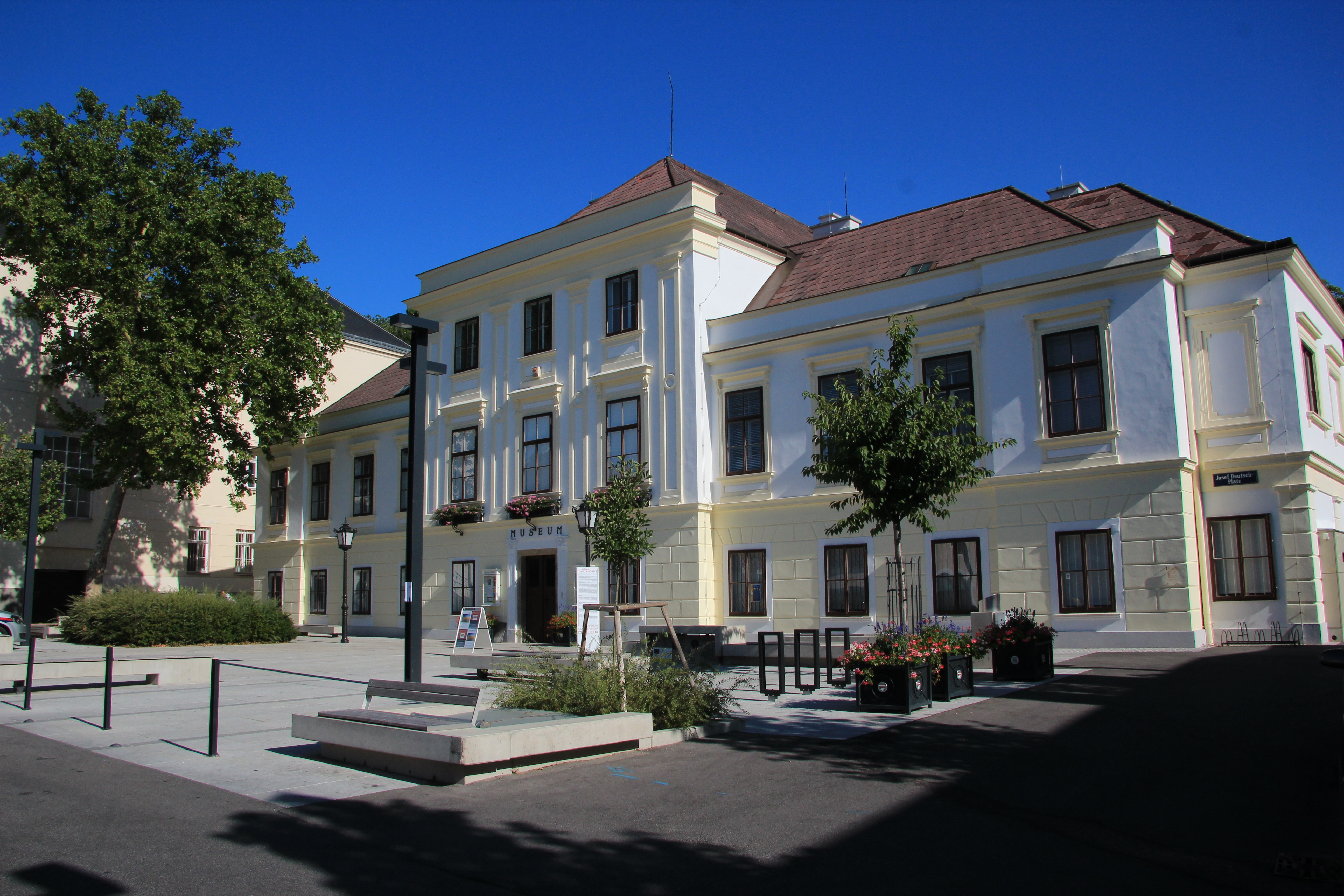 Museum in Mödling, Niederösterreich